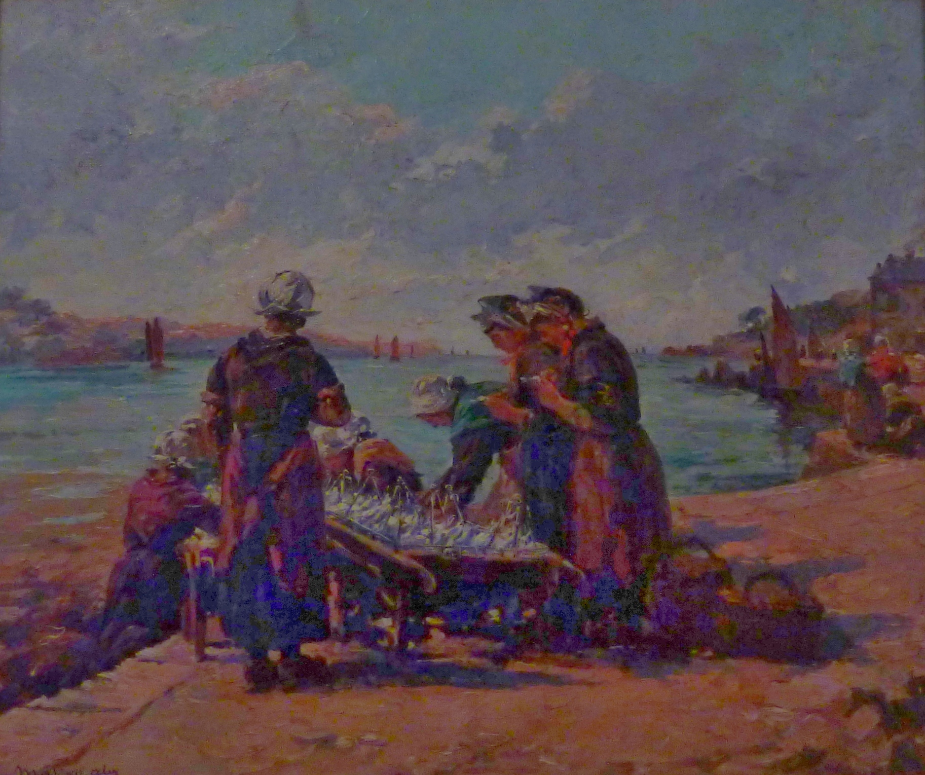 Le séchage des sardines sur civière à Douarnenez (tableau d'Alexandre Charles Masson datant de la première moitié du XXe siècle, collection du Port-Musée de Douarnenez, don de l'entreprise Connétable)